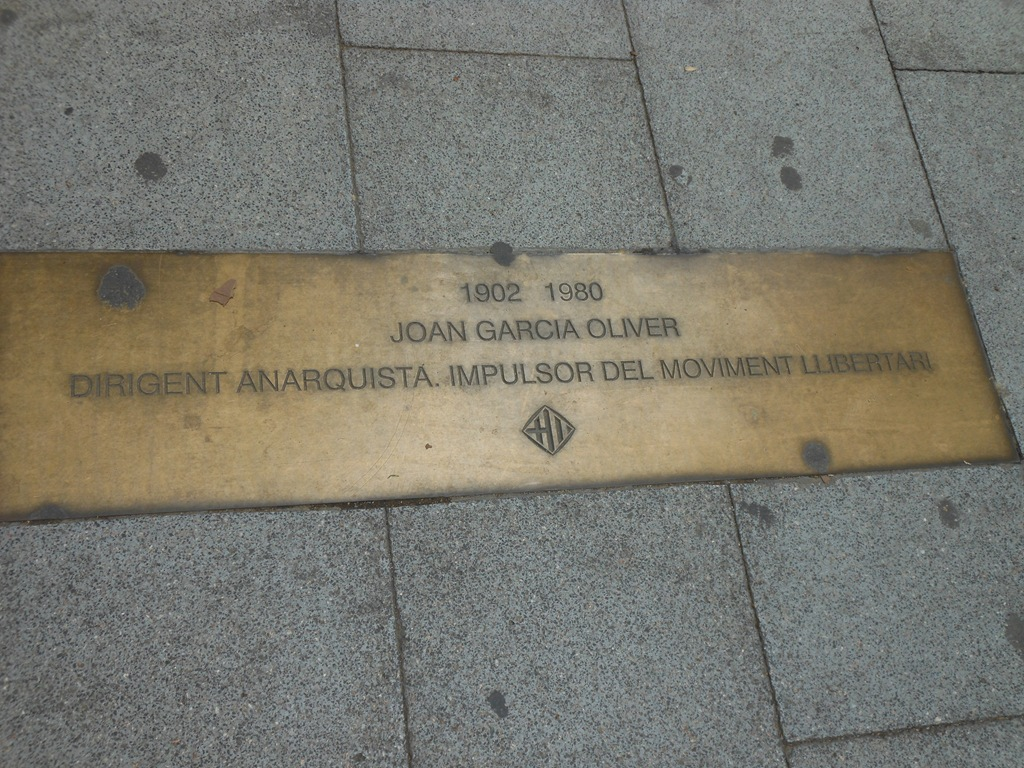 Joan García Oliver. Rambla del Poblenou (Barcelona)